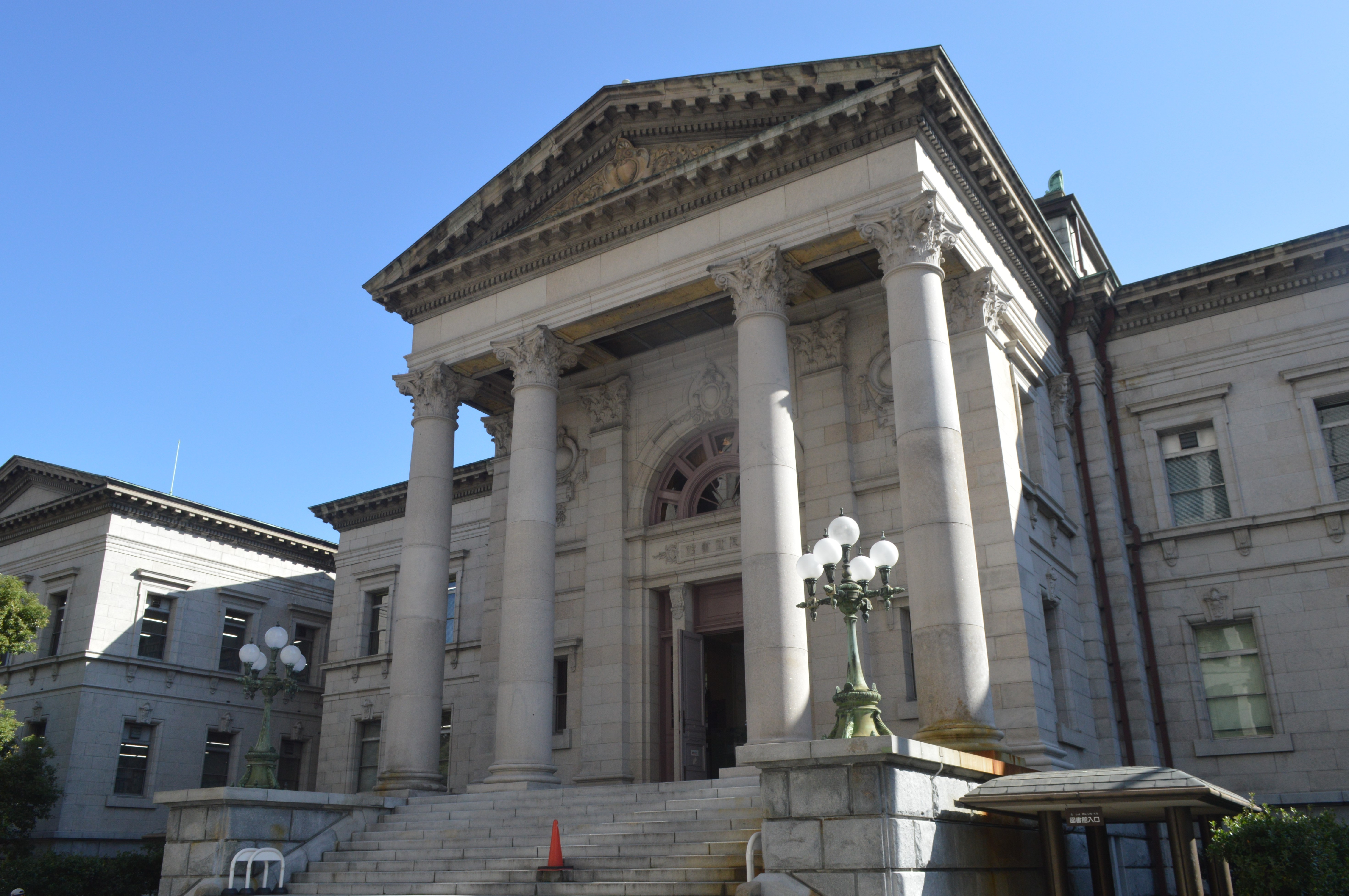 大阪府大阪市にある大阪府立中之島図書館。